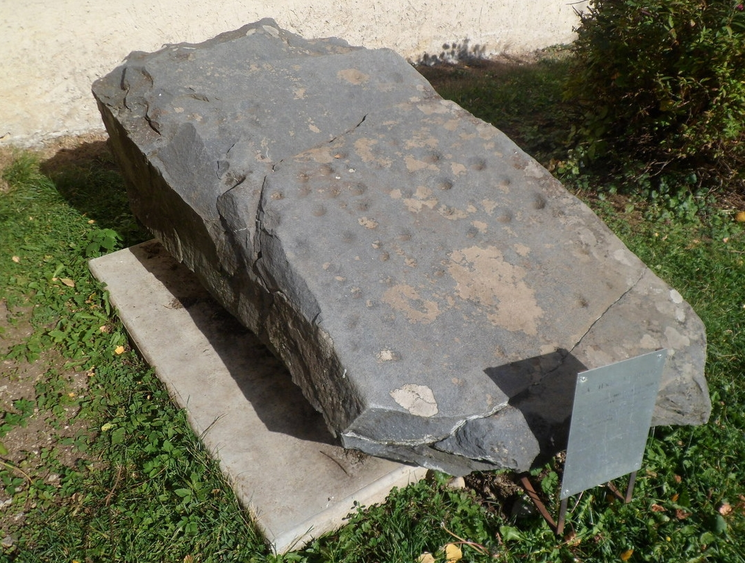 Pierre à cupules de St-Hilaire du touvet CR2017